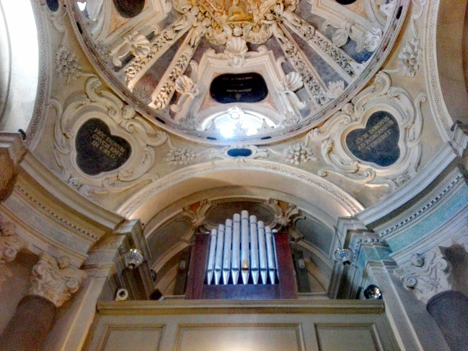 Vigevano, veduta della cantoria della chiesa del SS. Crocifisso con l'organo a canne positivo Chichi del 1972.